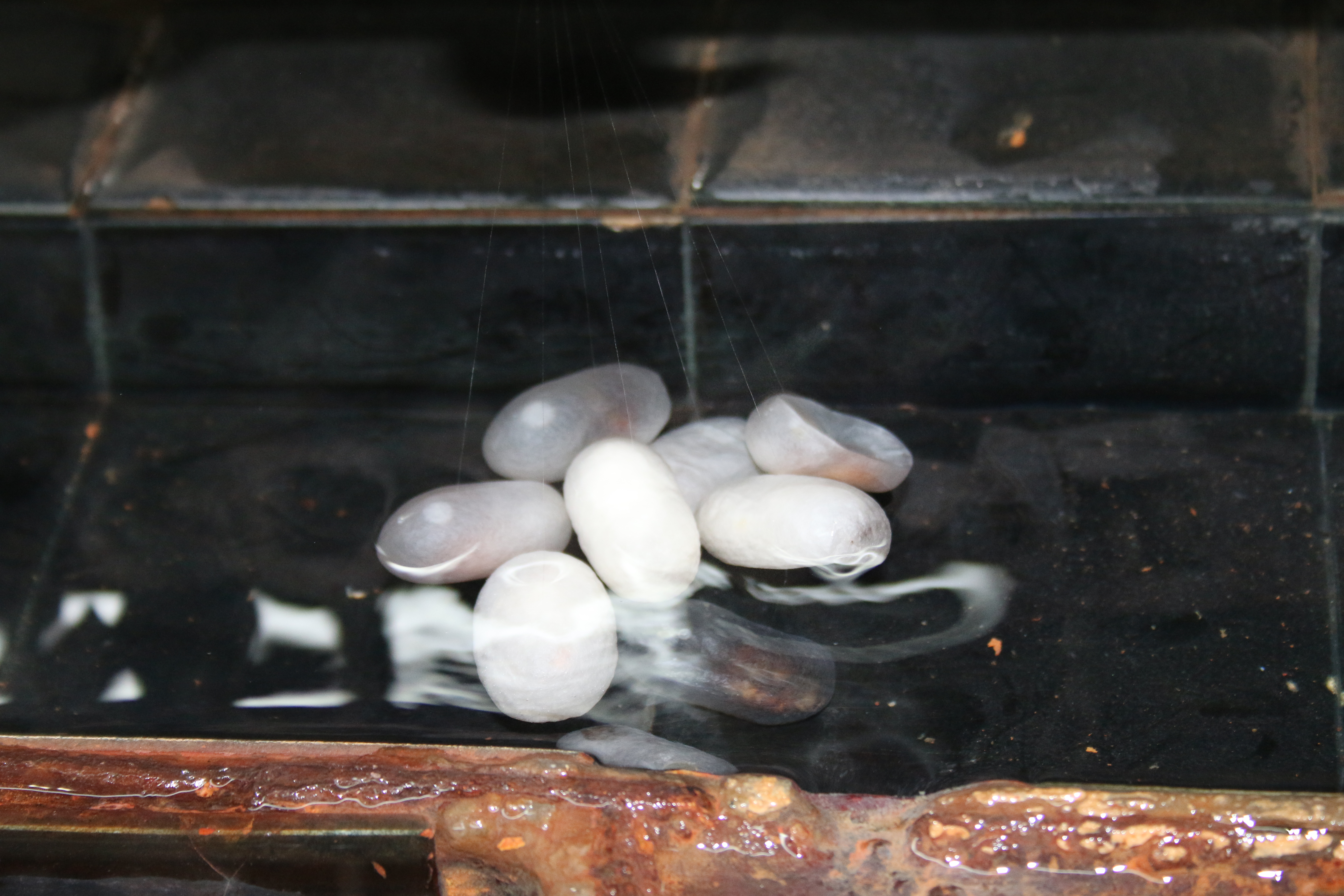 Seidencocon bei der Entschälung